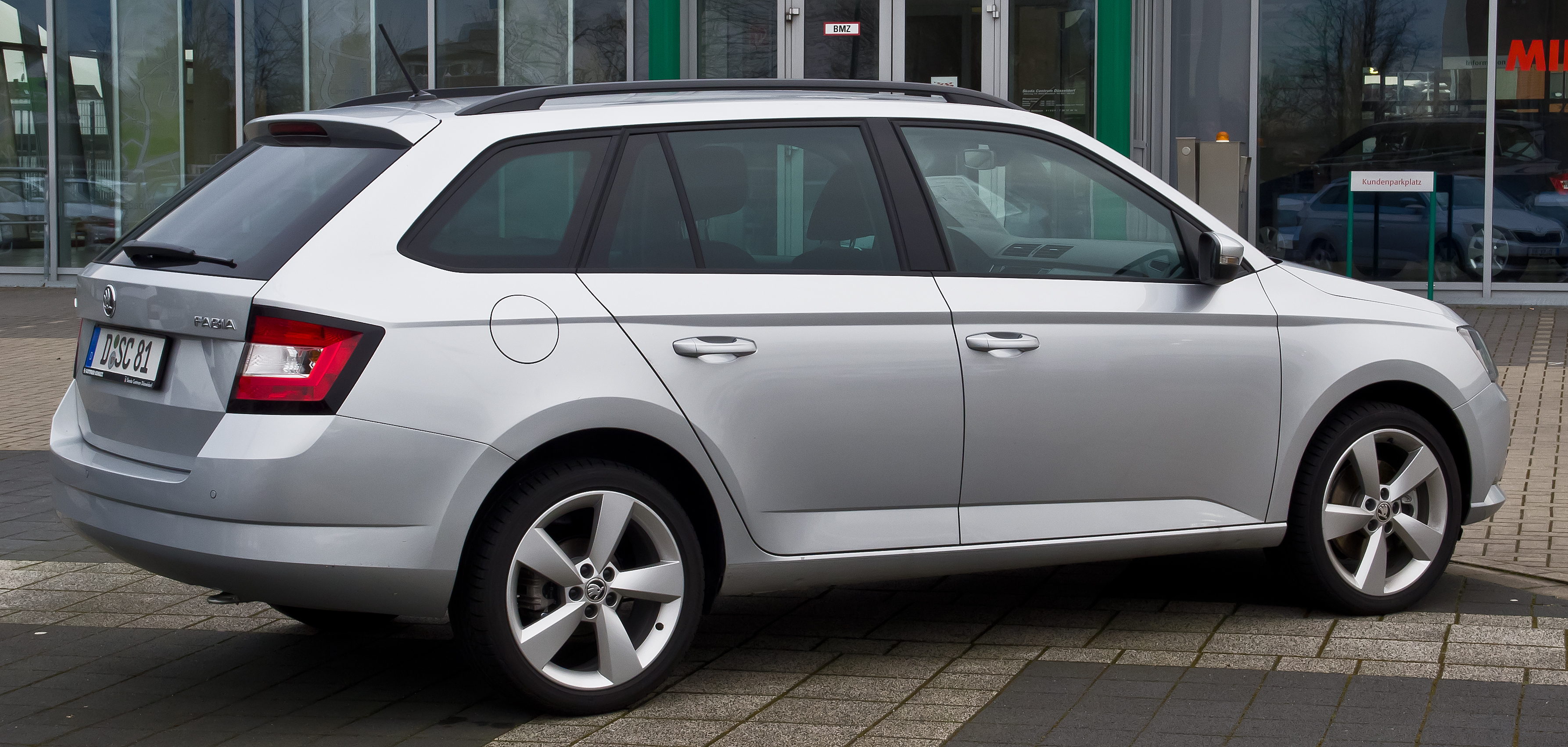 Skoda Fabia Combi 1.2 TSI Style (III)